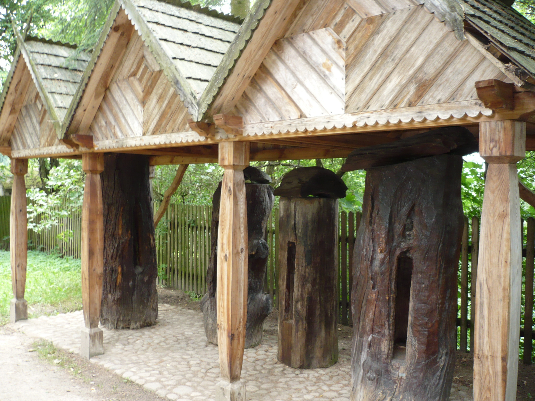 Ule-kłody w Skansenie w Nowogrodzie